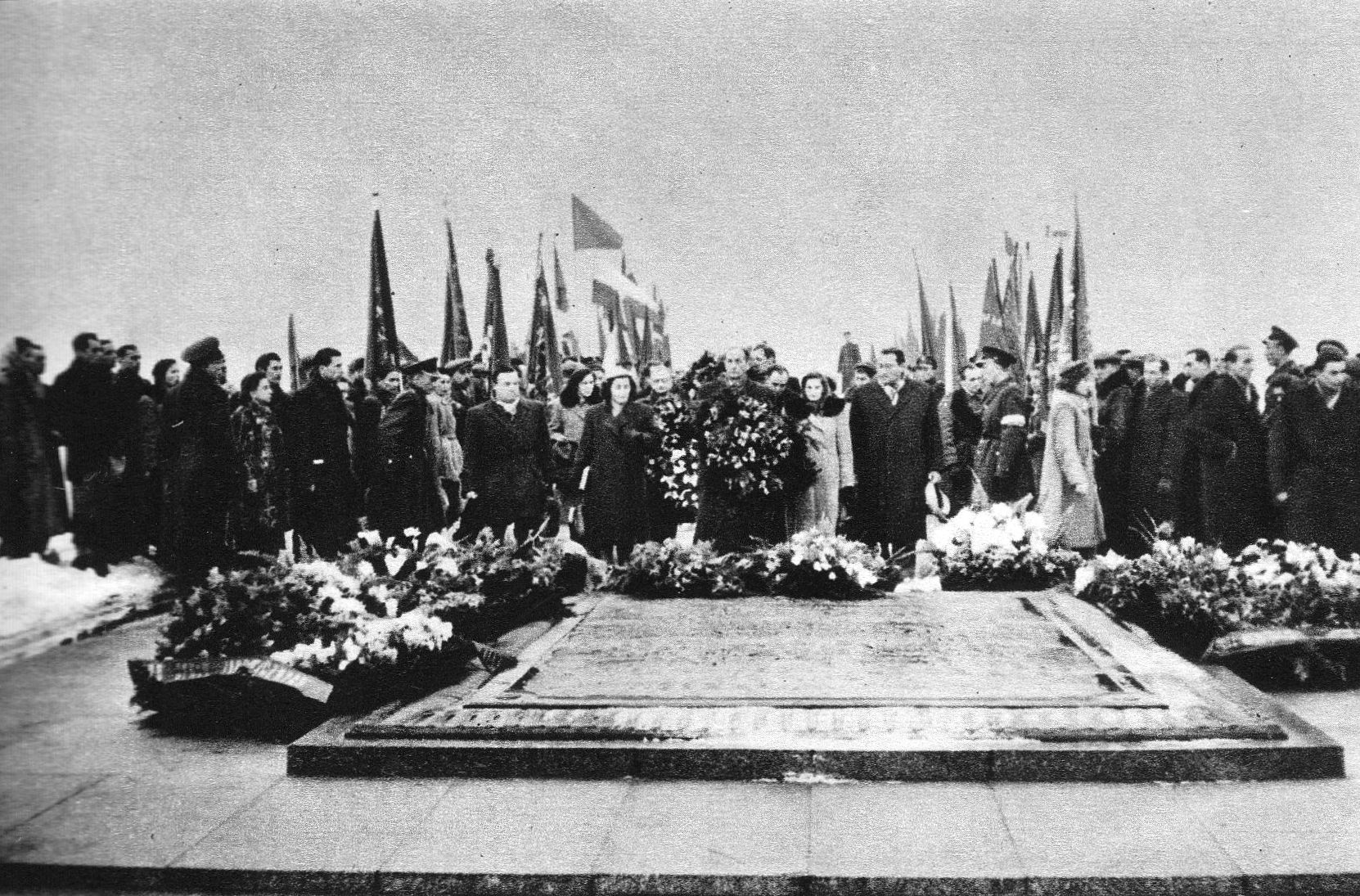 Uroczystości rocznicowe przy płycie Desatu Czerniakowskiego